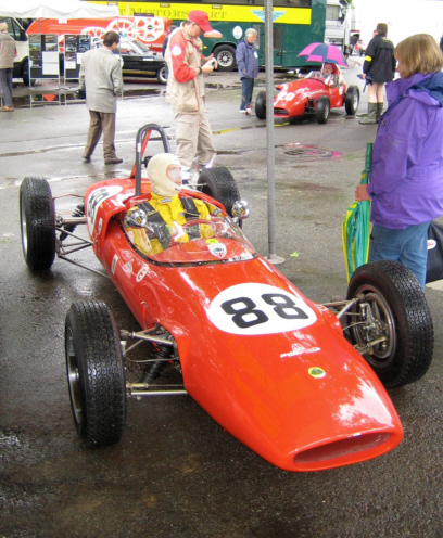 Lotus 20 Pau GP 2007